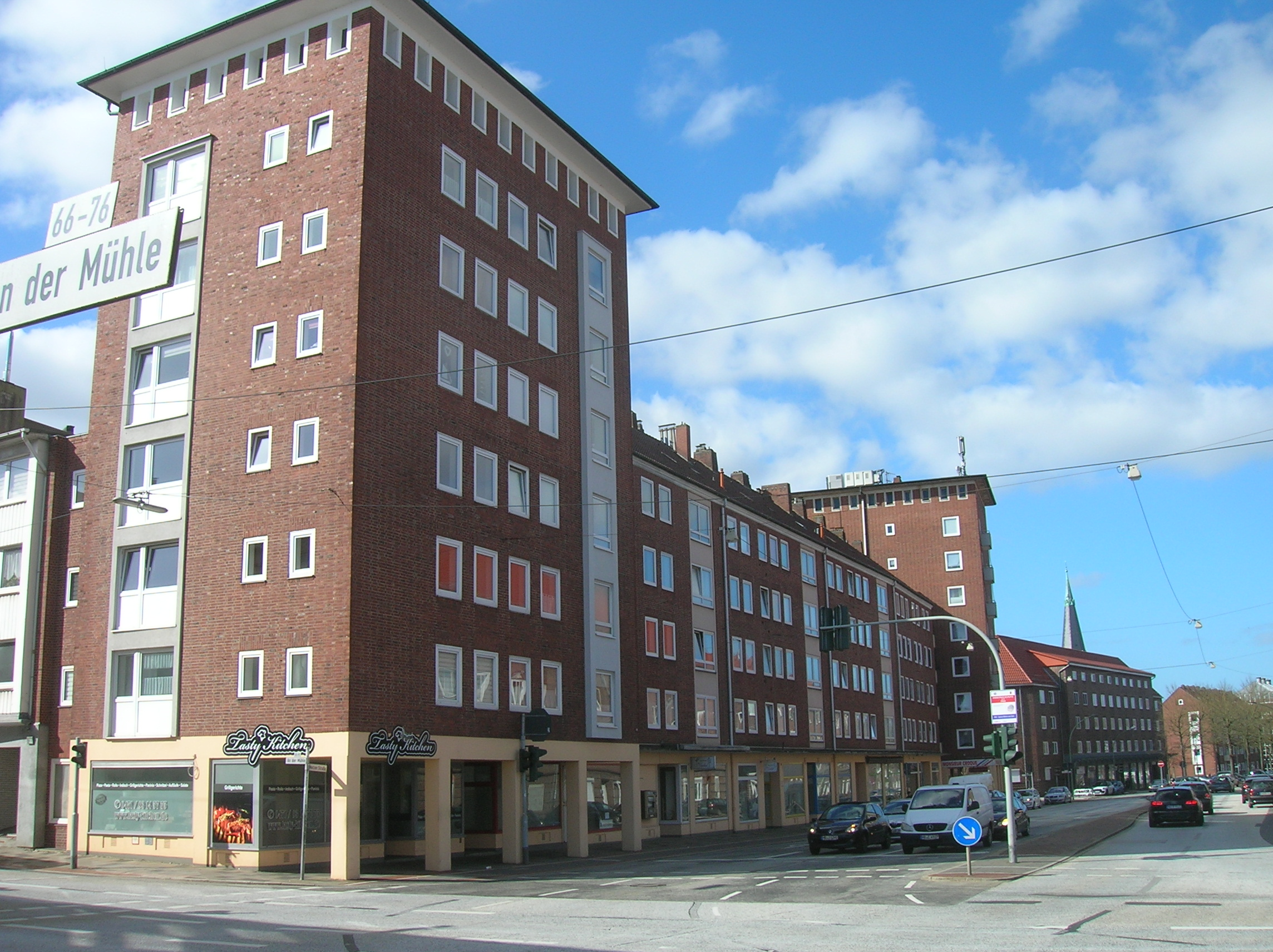 Westseite der Metzer Straße mit dem Eckhaus An der Mühle. In der Ladenzeile zwischen den Hochhäusern waren ein Blumenladen, ein Kiosk (Jimmy Knie), eine Fahrschule, ein Obsthändler, ein Feinkosthändler und ein Fischhändler.